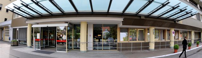 Eingang Vinzentius-Krankenhaus Landau